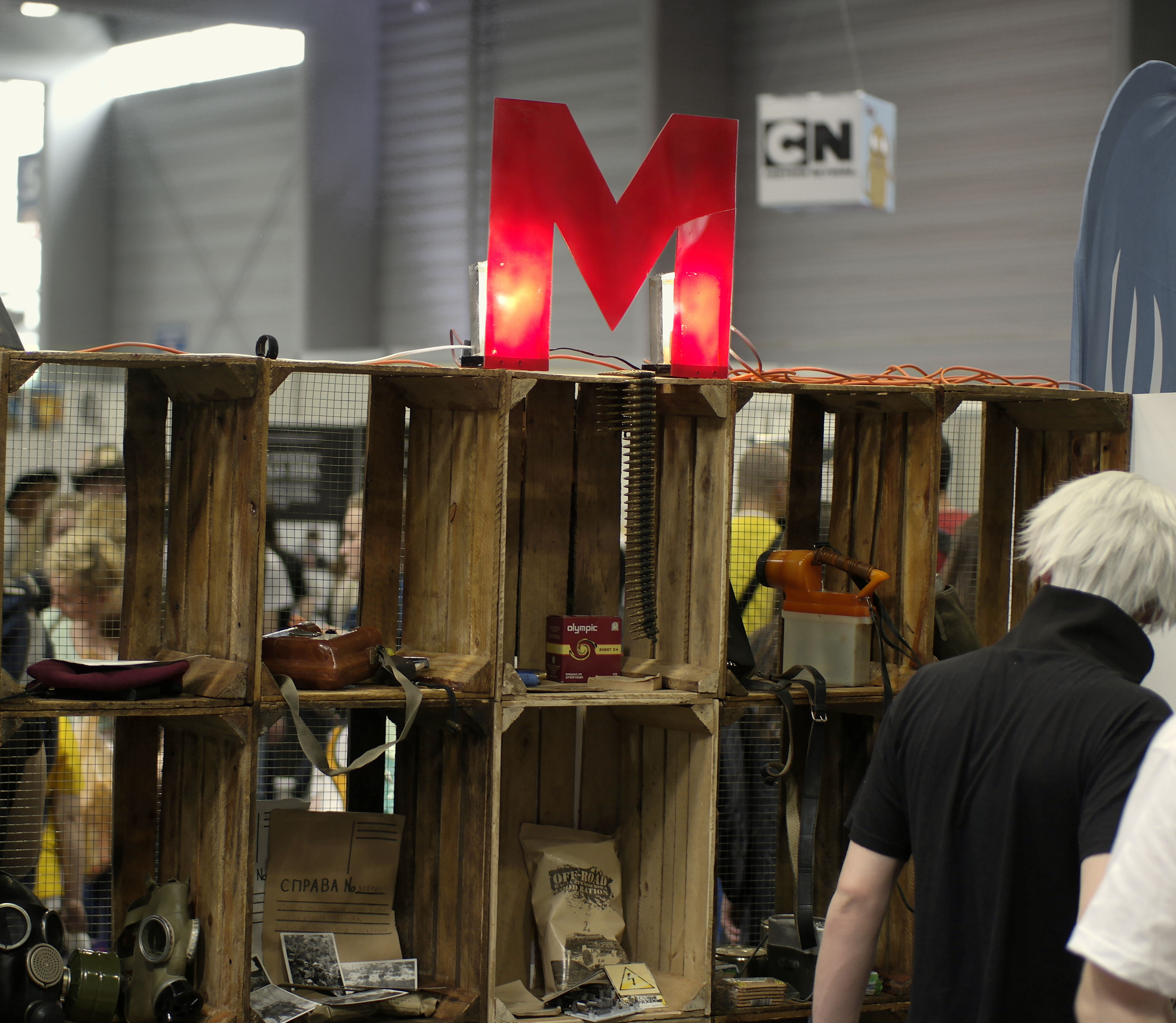 Stoisko Metro 2033, Festiwal Fantastyki Pyrkon w Poznaniu